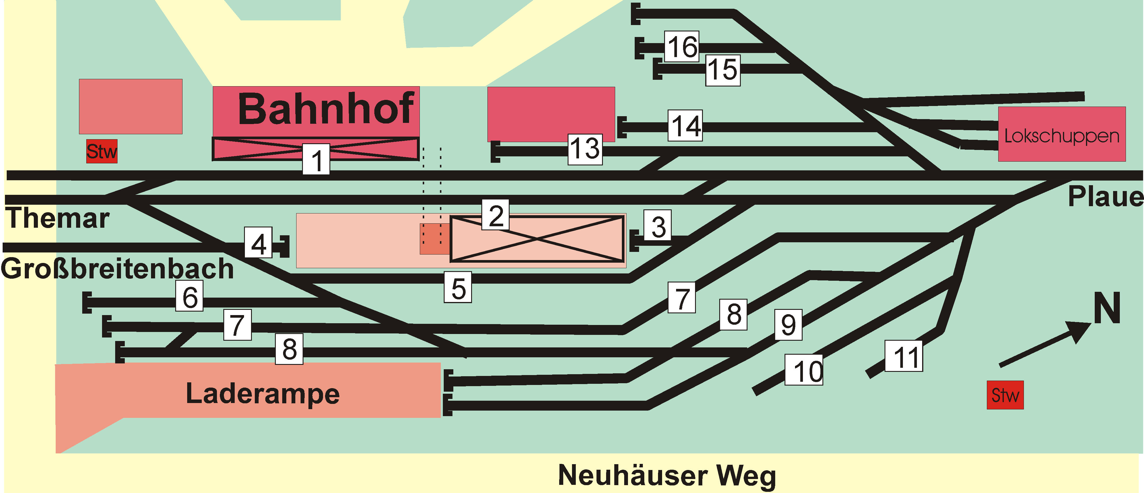 Gleisplan Ilmenauer Bahnhof 1928.